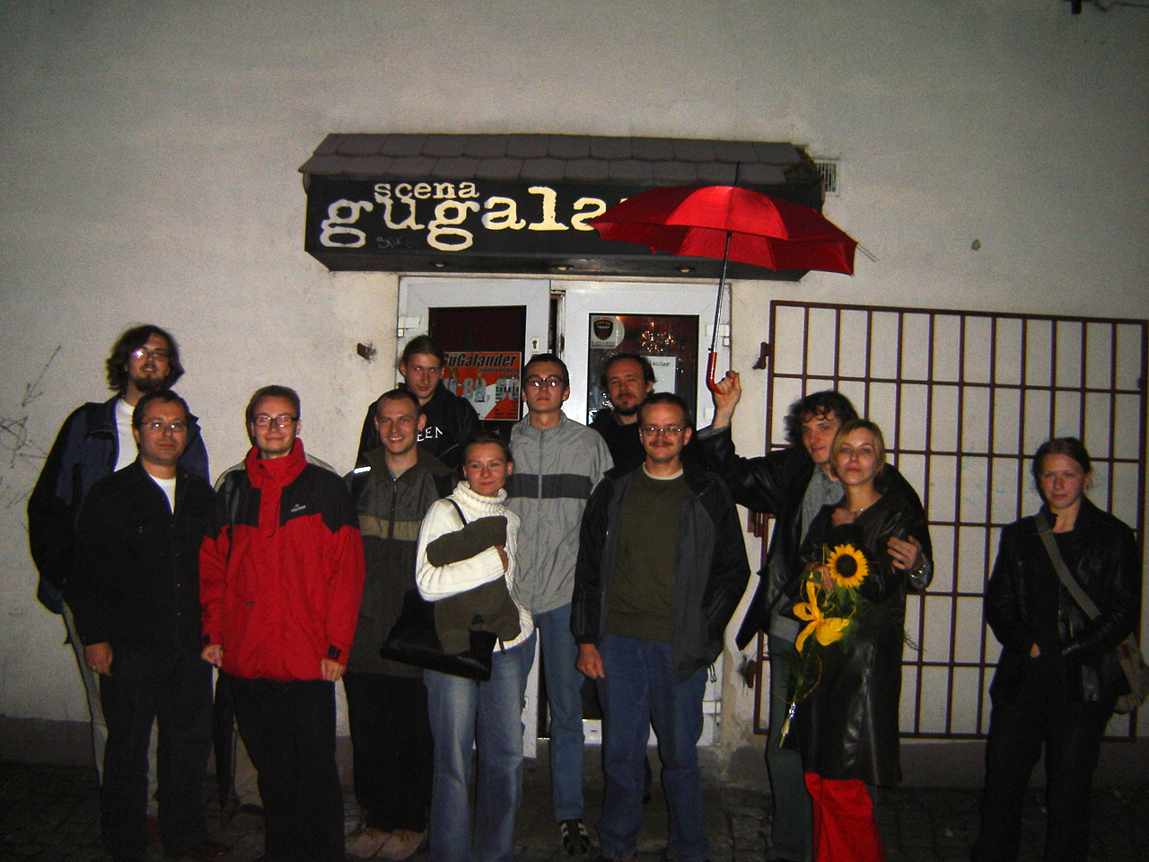 Template:Wikipedysta:Reytan/podpis grafiki